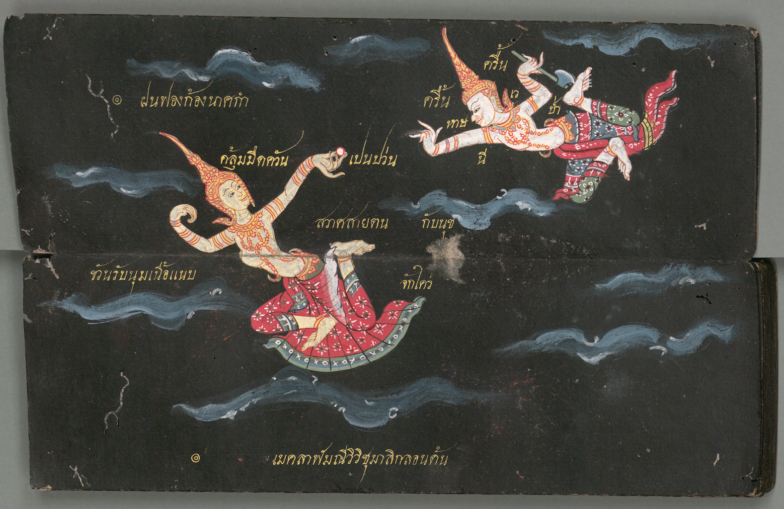 เมขลากับรามสูร